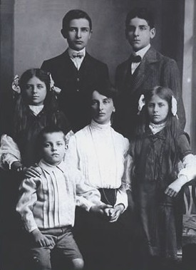 Инесса Арманд со своими детьми в Брюсселе в 1909 году